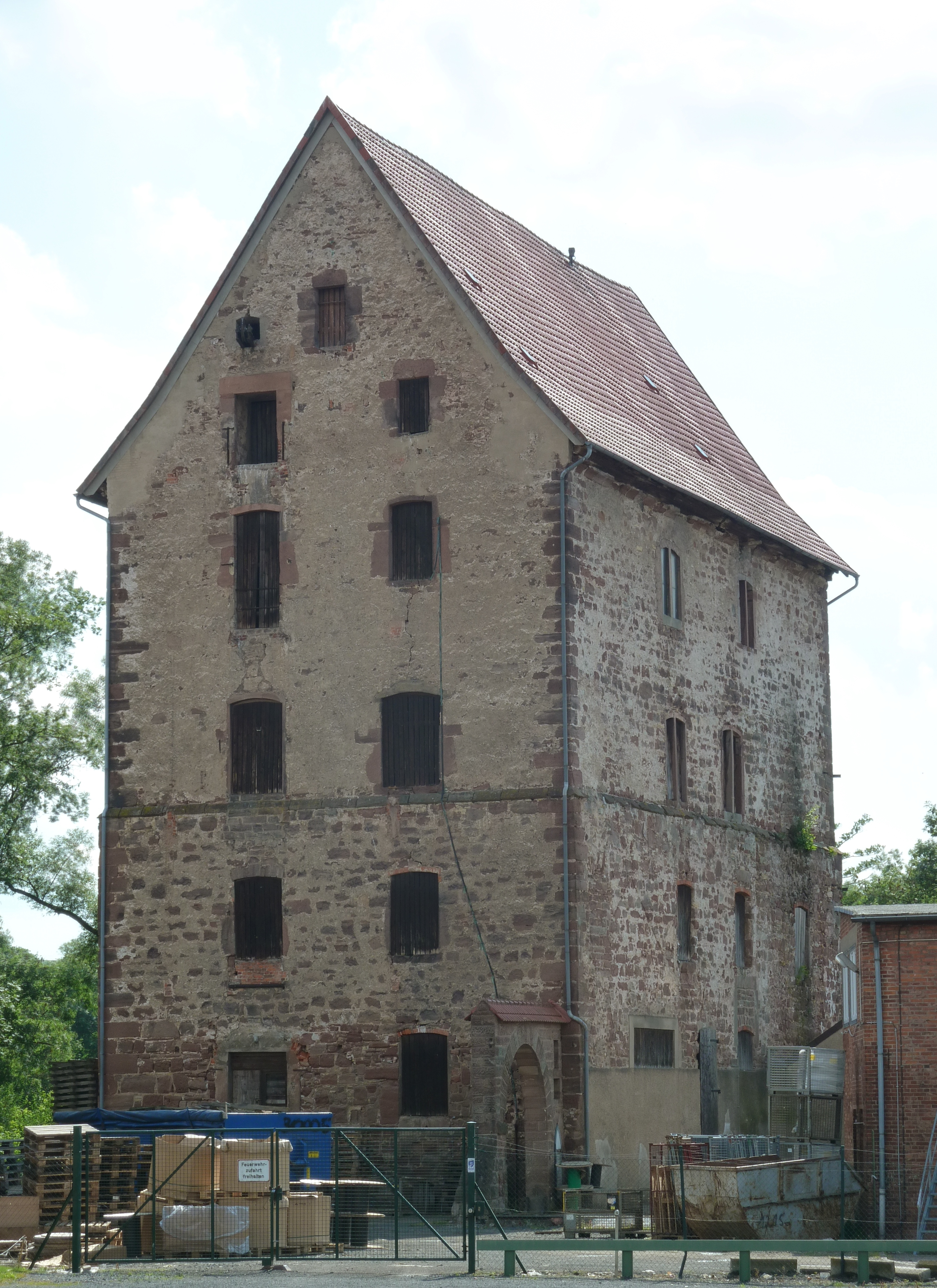 Blick von der Brückenstraße auf das Mushaus in Lindau, Gemeinde Katlenburg-Lindau, Landkreis Northeim, Niedersachsen. Bild aus drei Fotos mit unterschiedlichen Belichtungen zusammengefügt